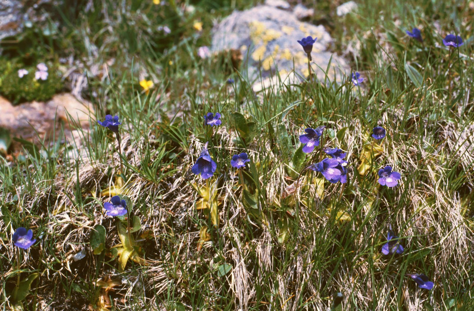 Dünnsporn-Fettkraut (Pinguicula leptoceras Reichenb.), Wasserschlauchgewächse (Lentibulariaceae) - Italien/Italia/Italy: Trentino-Alto Adige/Südtirol, Prov. Bolzano/Bozen, Timmelsjoch